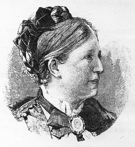 Stich der Schriftstellerin Maria Lipsius, Künstlername La Mara